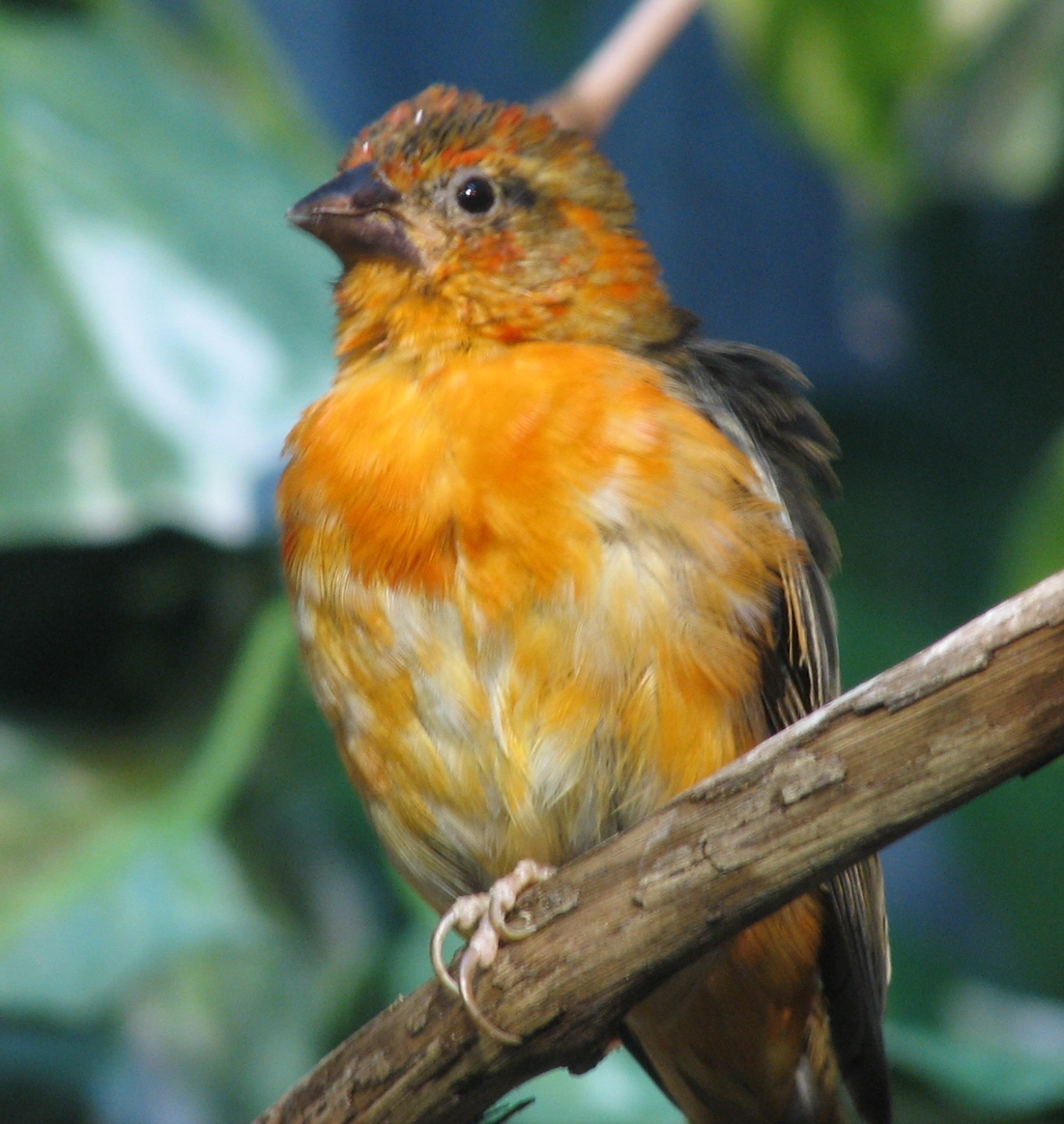 Madagascar Red Fody(Foudia madagascariensis)